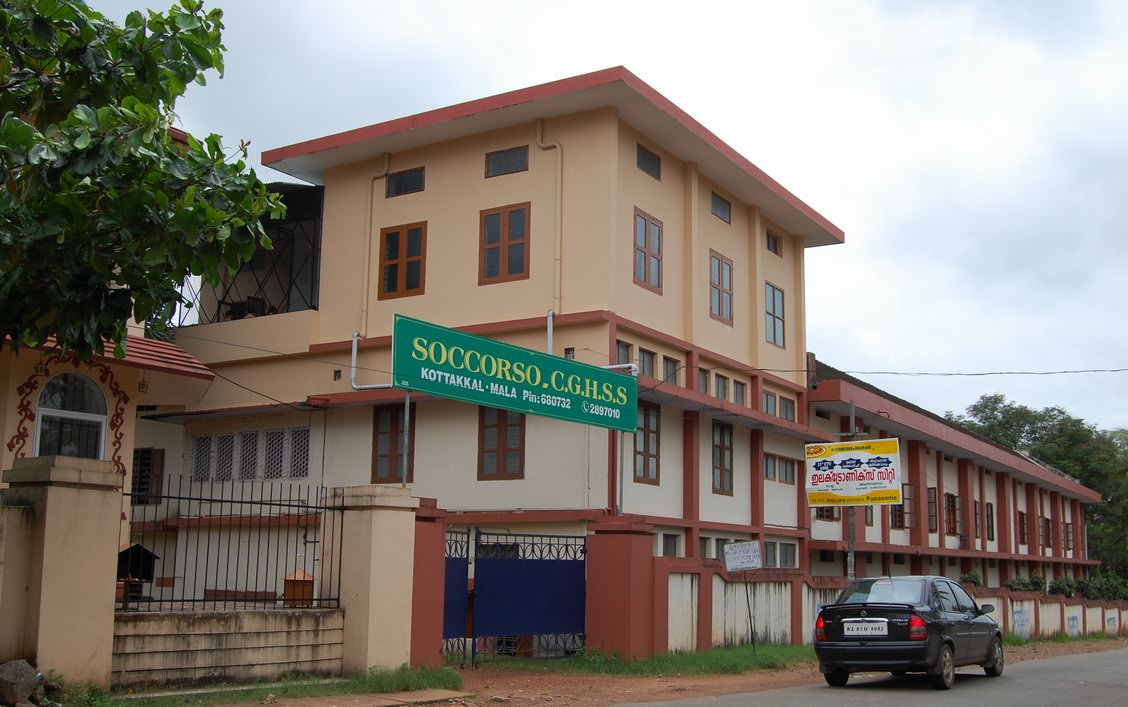 Soccorco high school mala